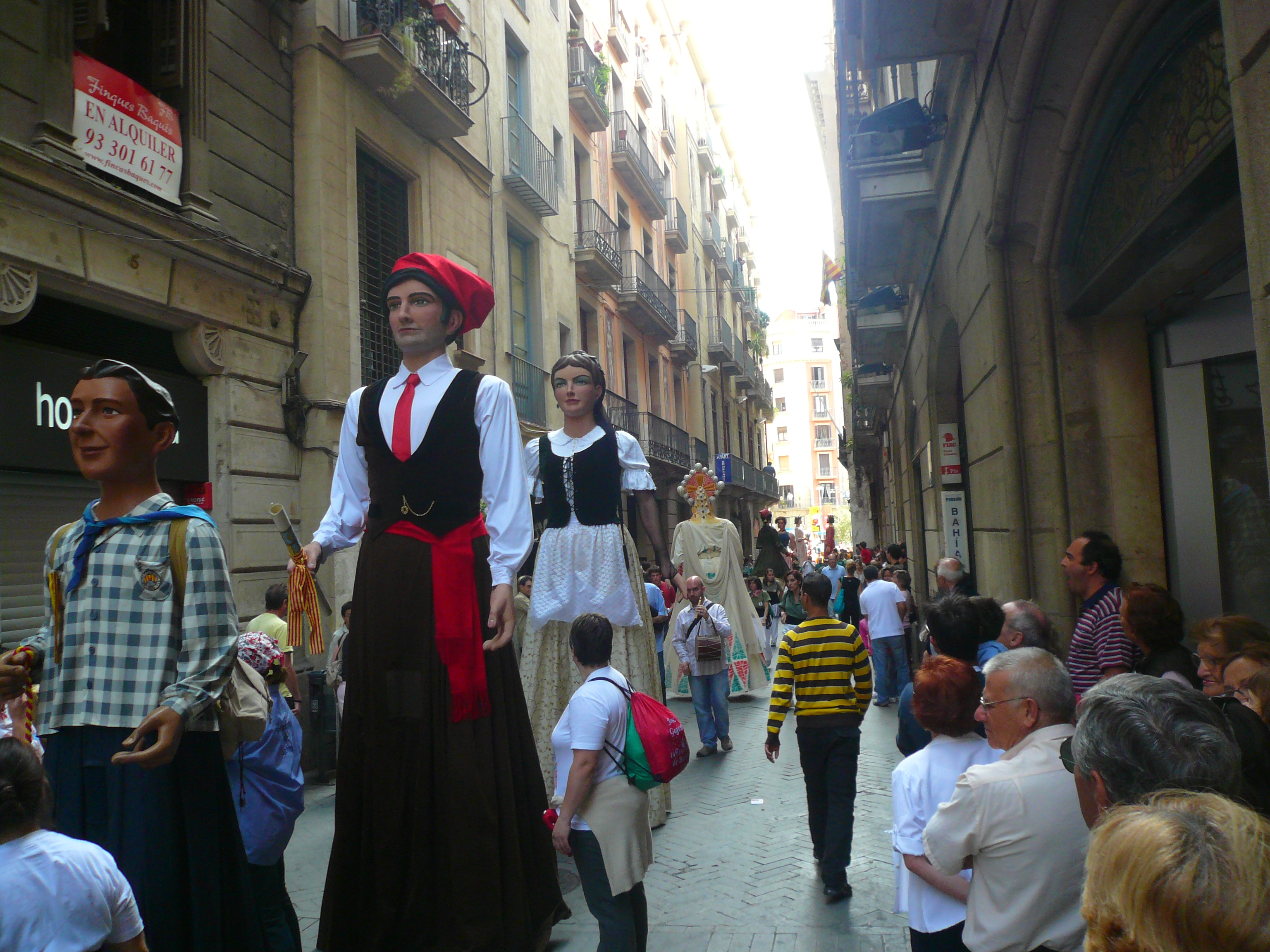 Cavalcada de gegants de les festes de la Mercè del 2008, al tram del carrer Cardenal Casañas, carrer del Pi, carrer Canuda i la Rambla